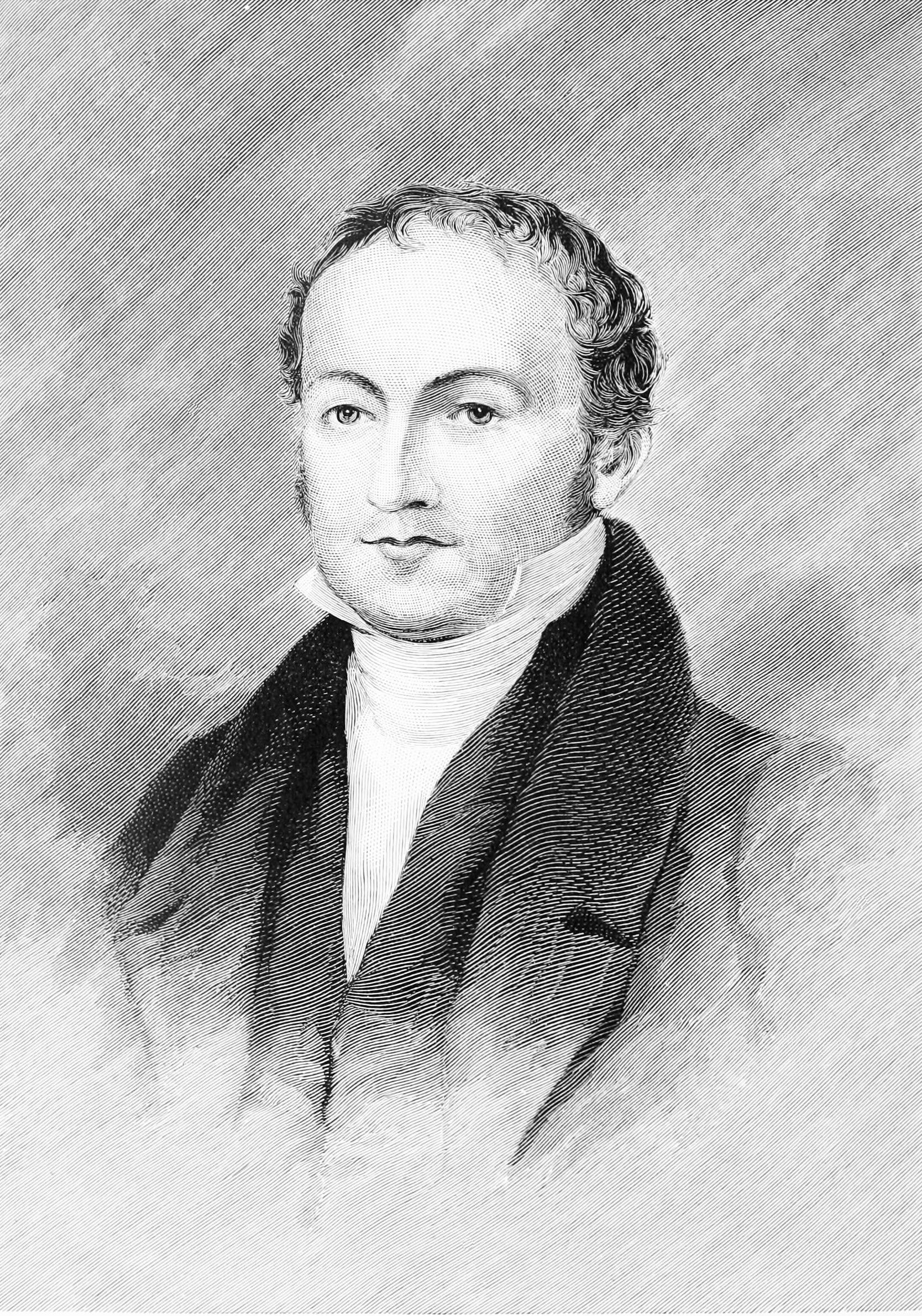 Lewis David von Schweinitz